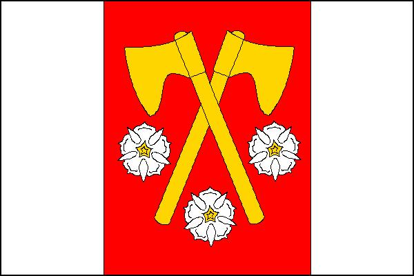 Vlajka obce Skorošice